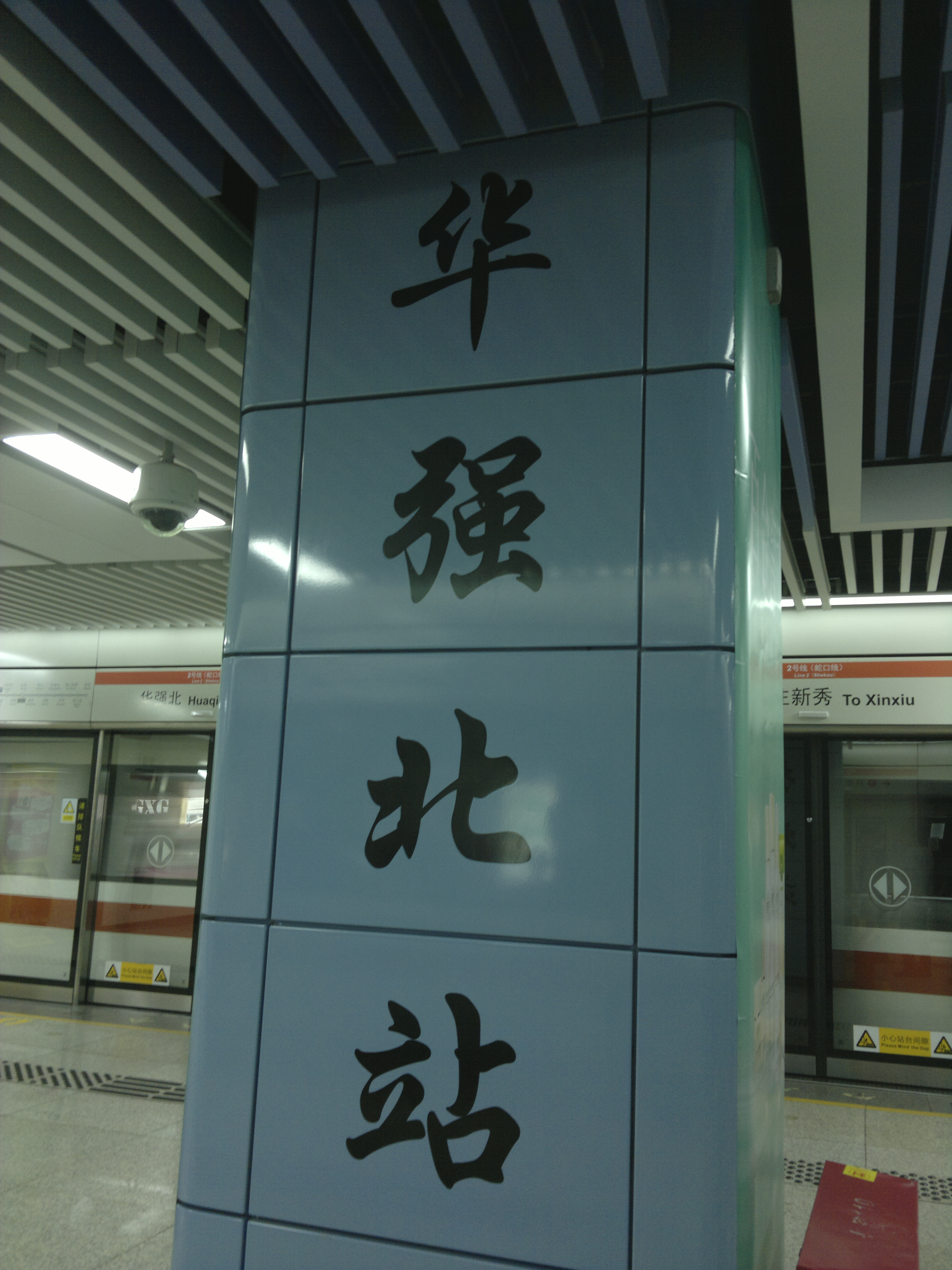 站台立柱书法字